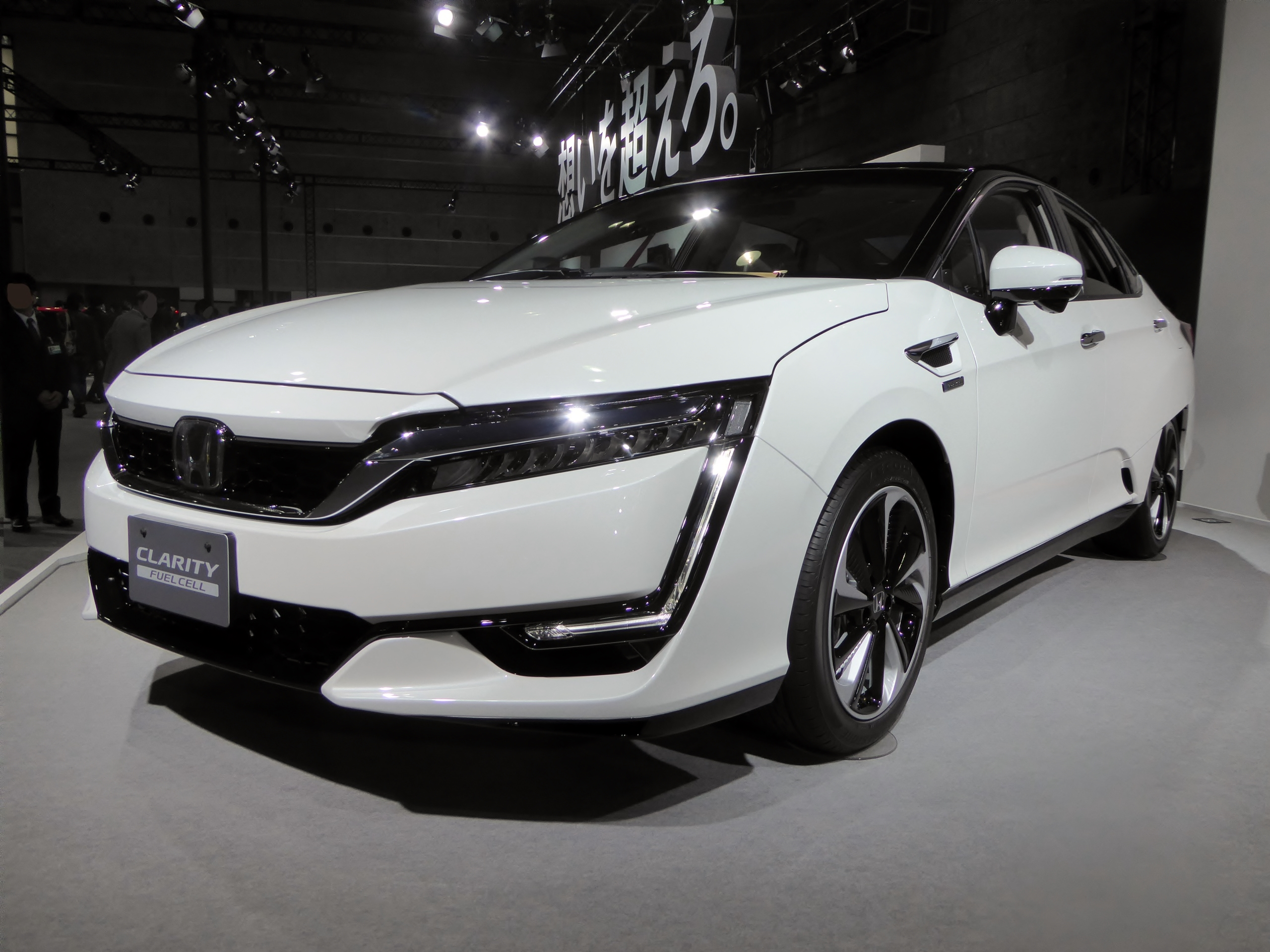 大阪モーターショー2015においてホンダ・クラリティフューエルセルを撮影。